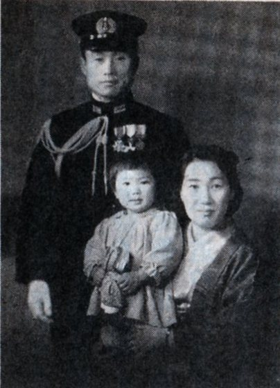 Kunisada Kaneo is an Imperial Japanese Navy lieutenant commander.